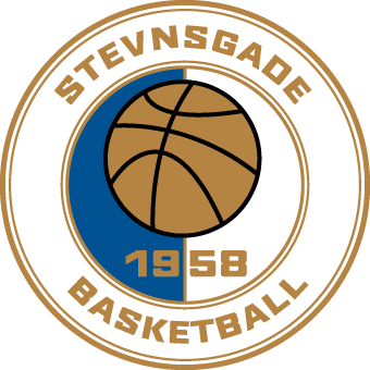 BK Skjold/Stevnsgade Basket Logo